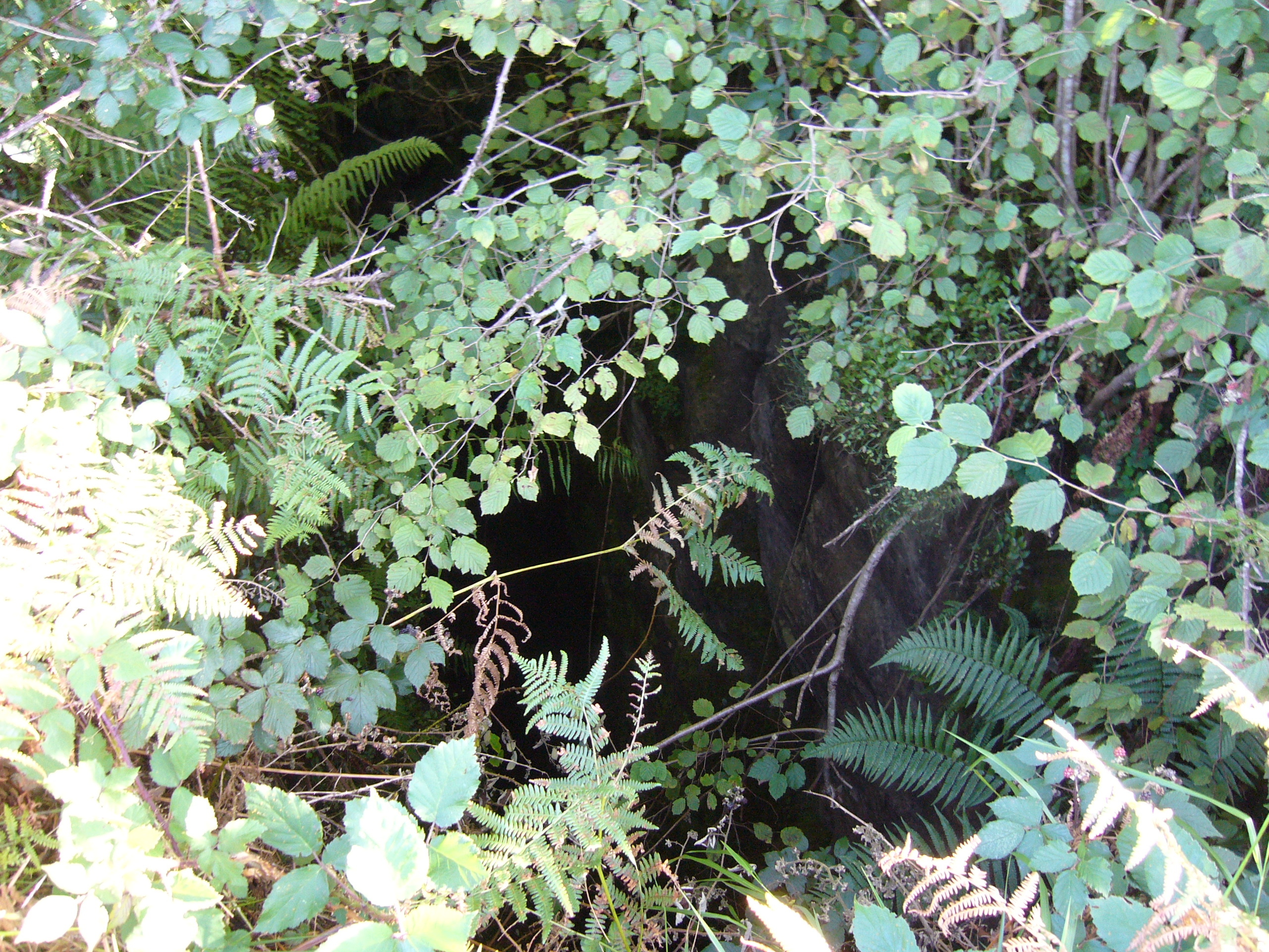 Aizkultzetako leizea